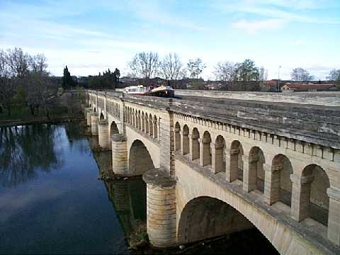 Le Pont-Canal qui permet au Canal du Midi à Béziers de franchir l'Orb.